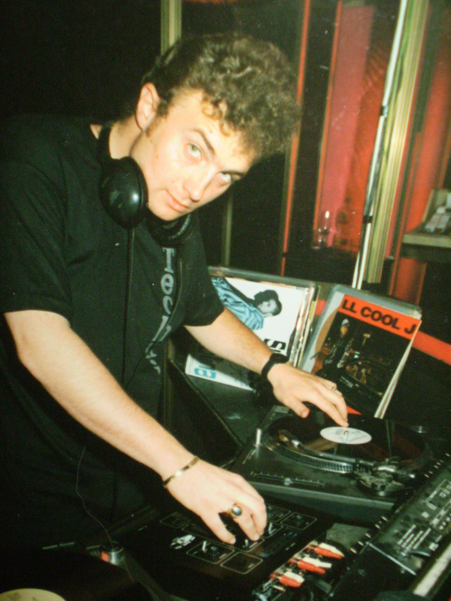 Боян Илчев - диджей Боби Ай миксира